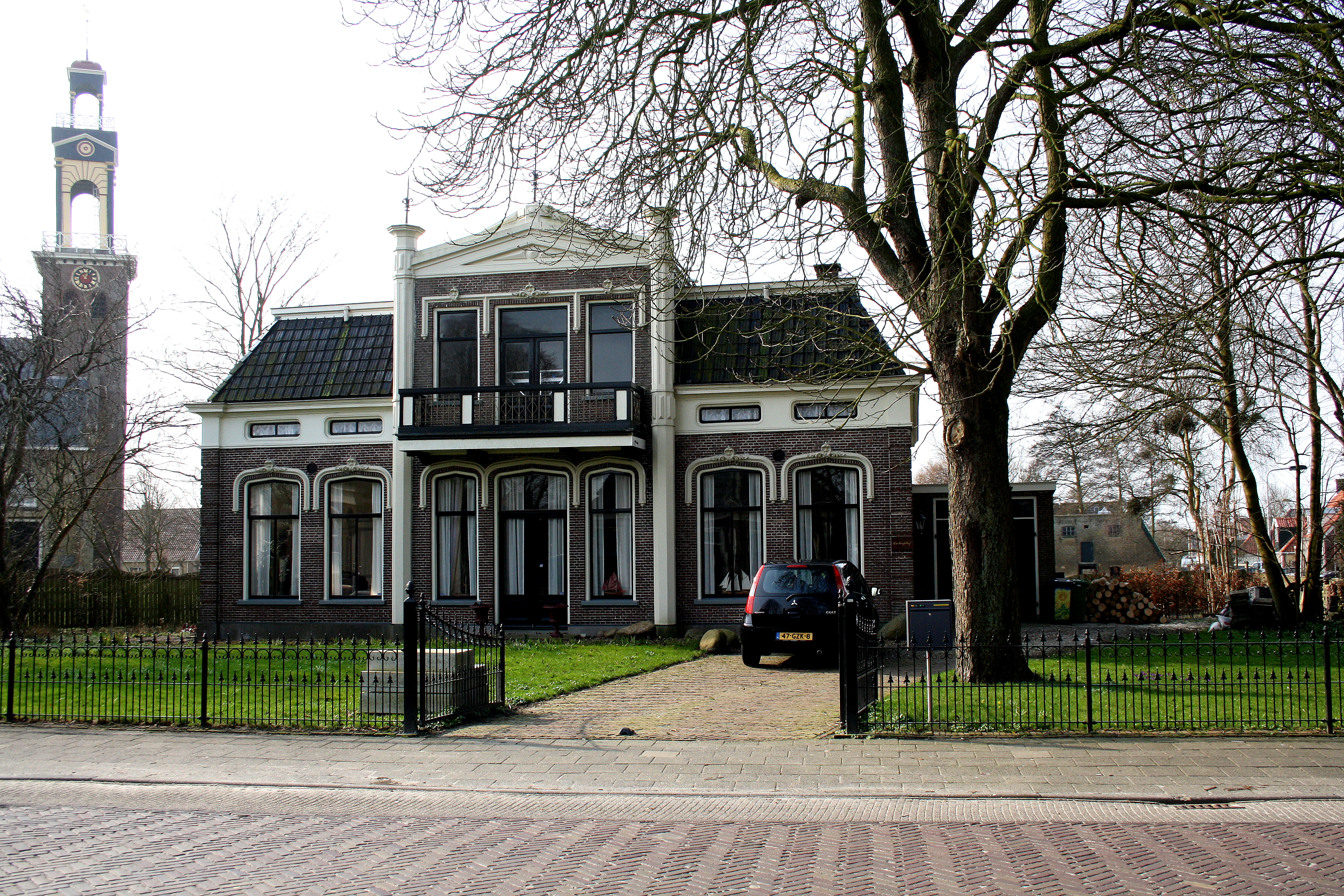 Voormalige dokterswoning gebouwd in 1882. Sytzamaweg 13